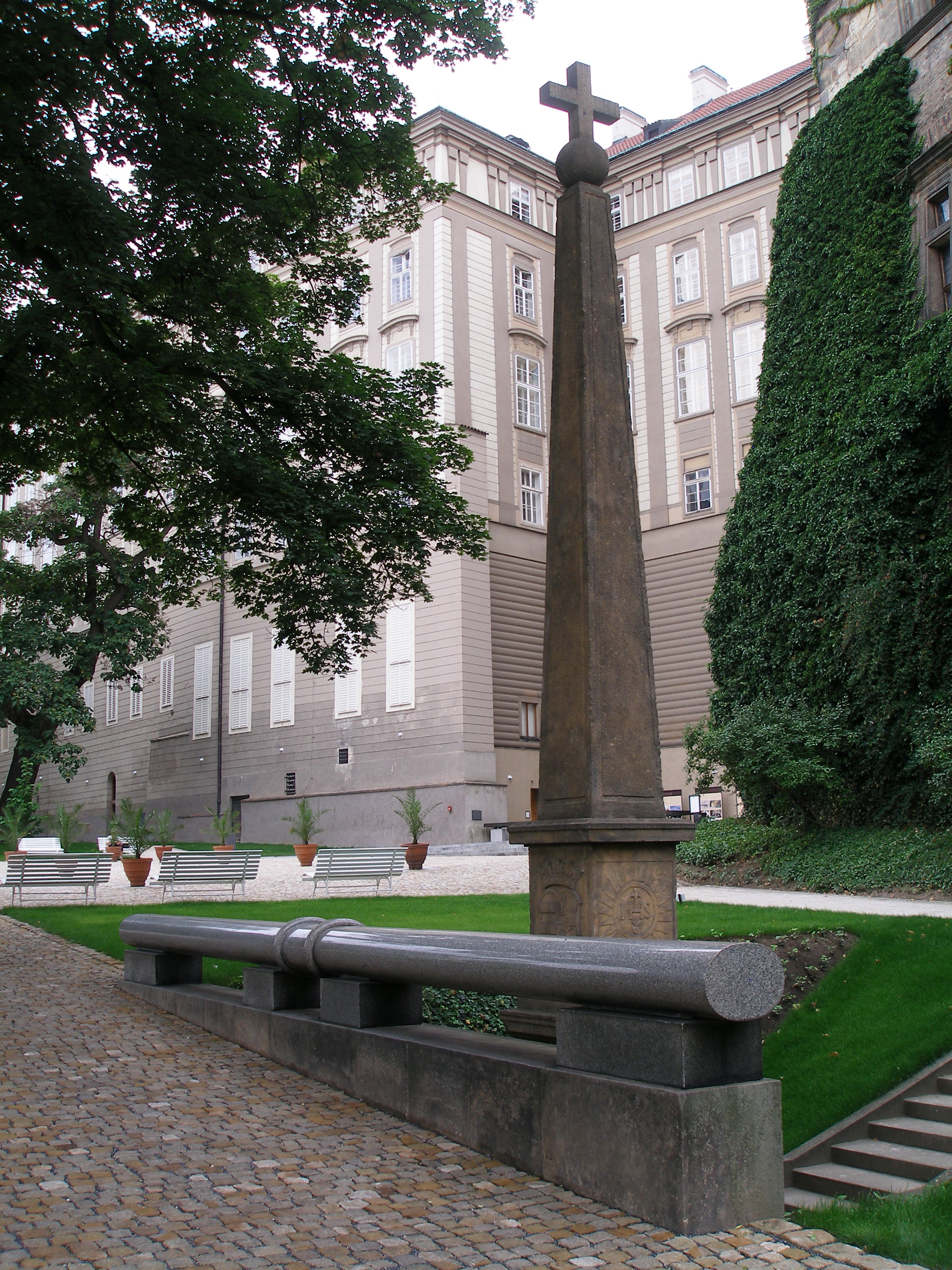 Barokní kamenný sloup v Jižních zahradách Pražského hradu, označující místo dopadu Viléma Slavaty.